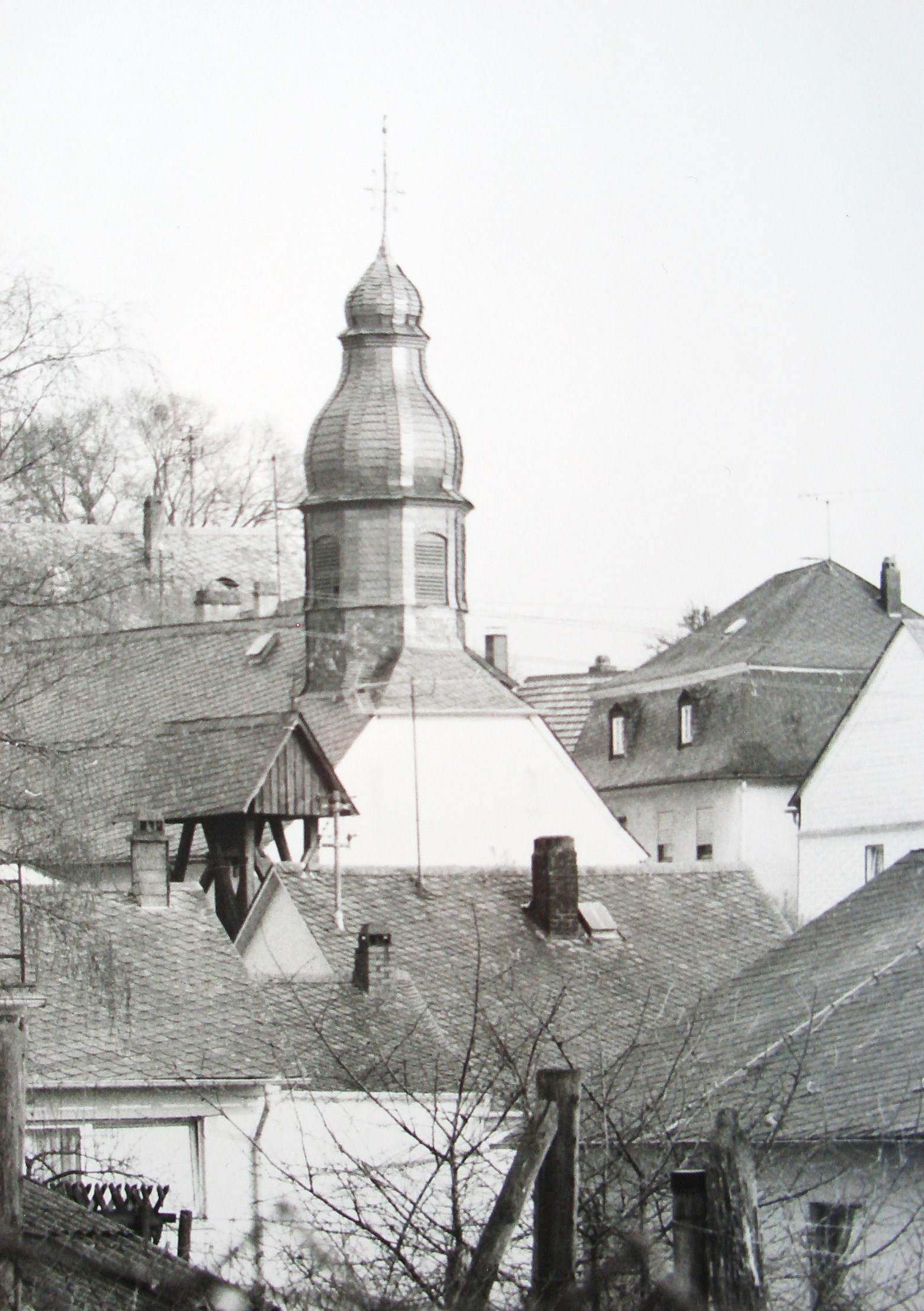 Mutterschied, Dorfkern mit der Kirche (Baubeginn 1752) Foto A. d´Orfey, 1980